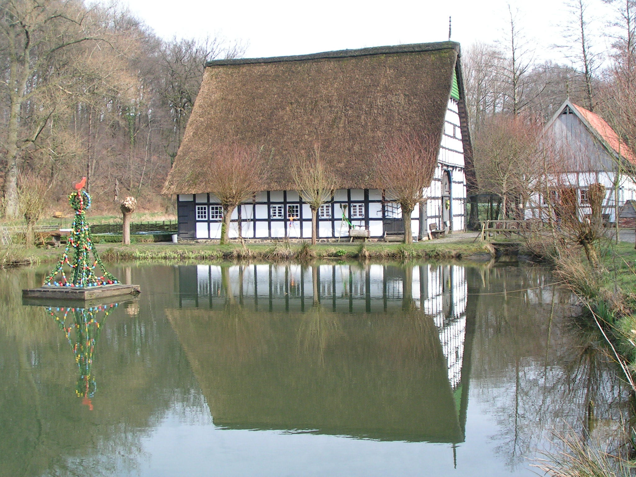 Rürups Mühle (Wassermühle) in Löhne